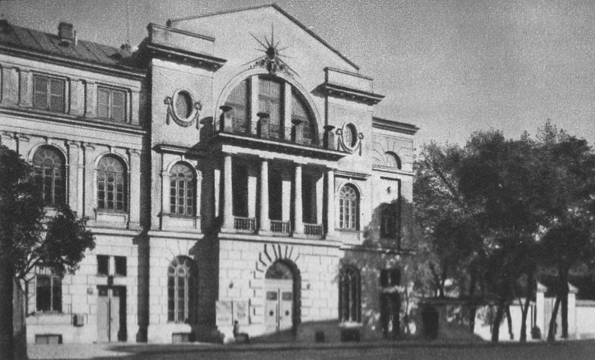 Konserwatorium Muzyczne -[przy ul. Okólnik 1 w Warszawie